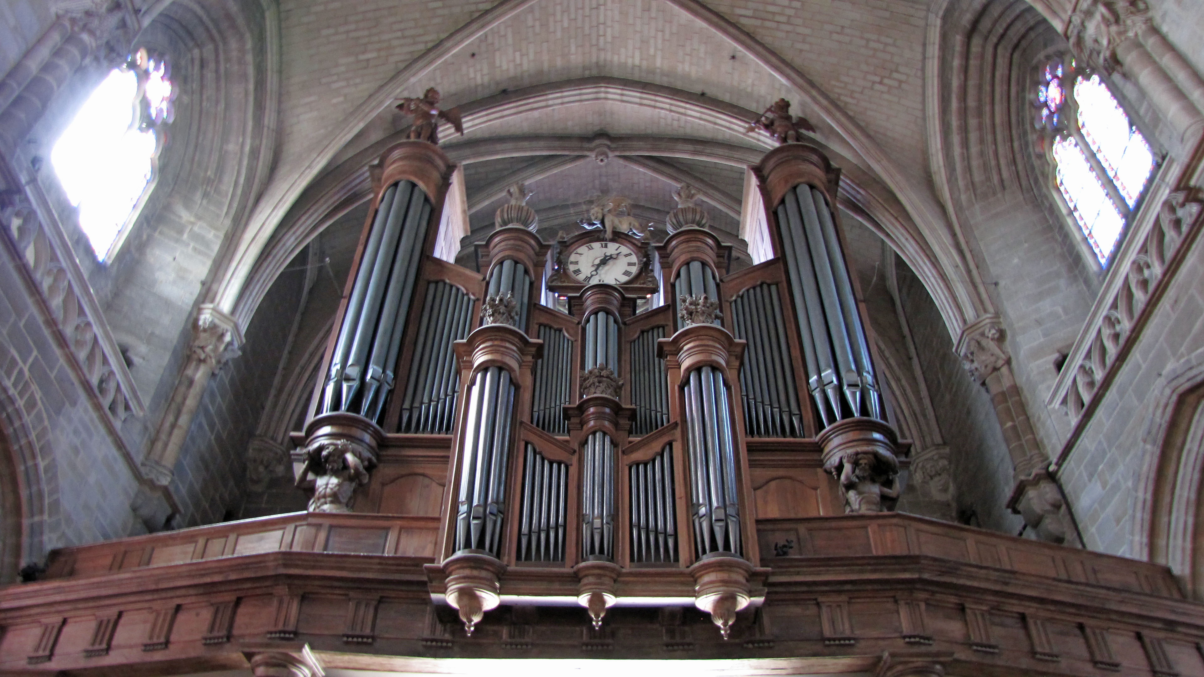 Cathédrale Saint-Pierre de Vannes